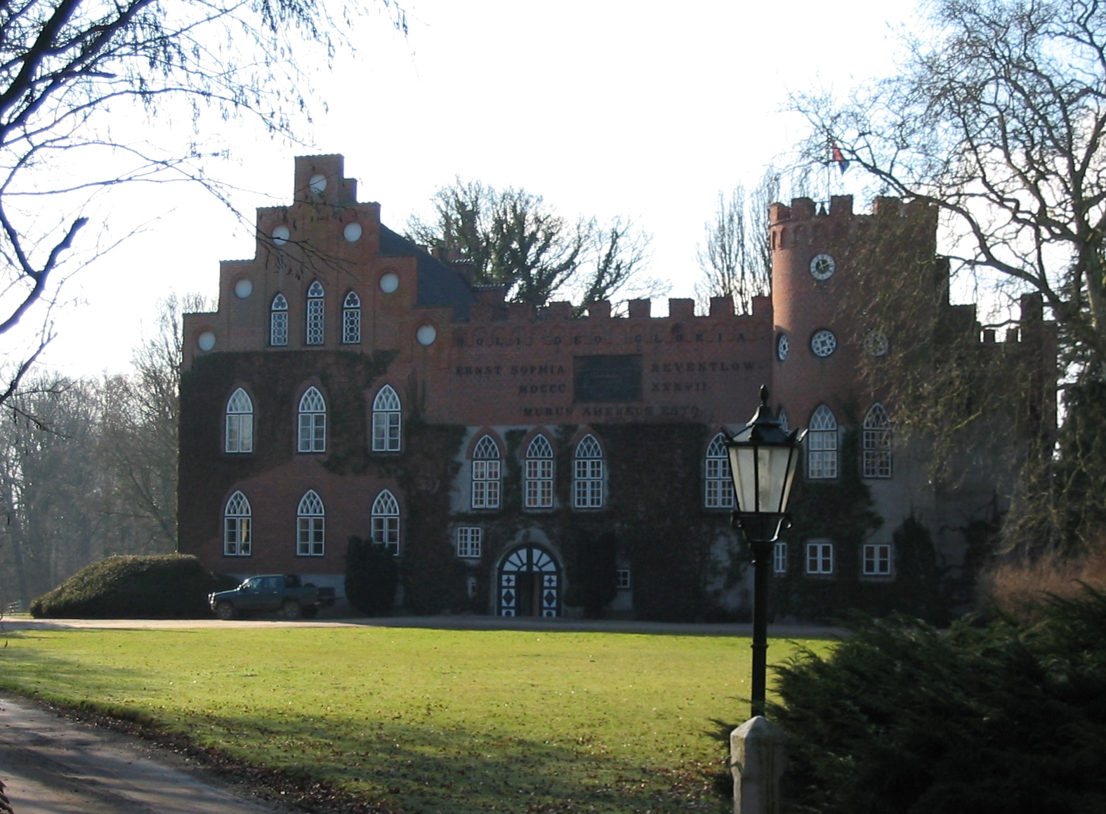 Gut Farve, Herrenhaus, Farve Wangels, Ostholstein